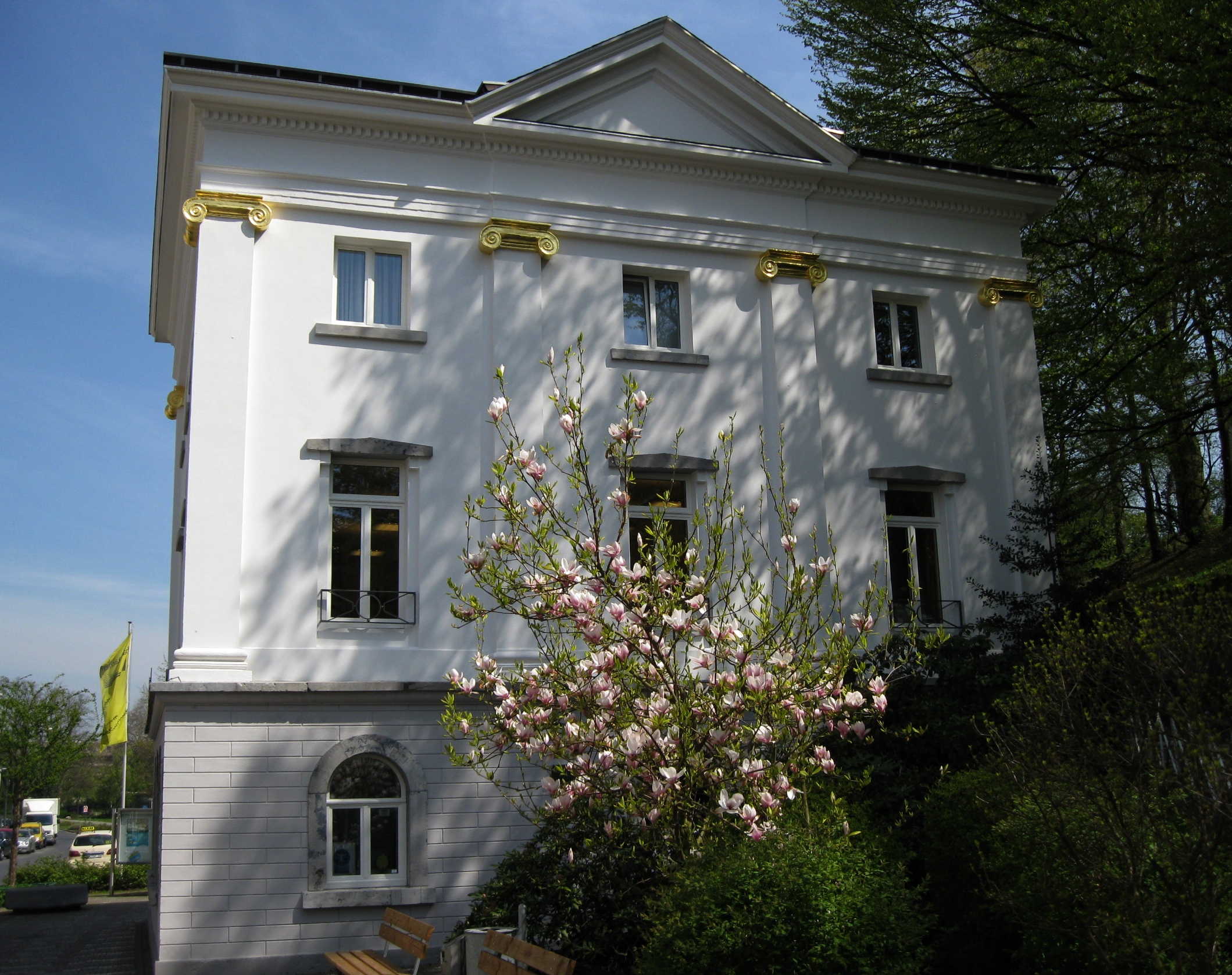 Das Alte Rathaus von Burtscheid, war früher auch Gefängnis und Polizeistation und Teil des Neubades; Architekt Christian Wilhelm Ulich